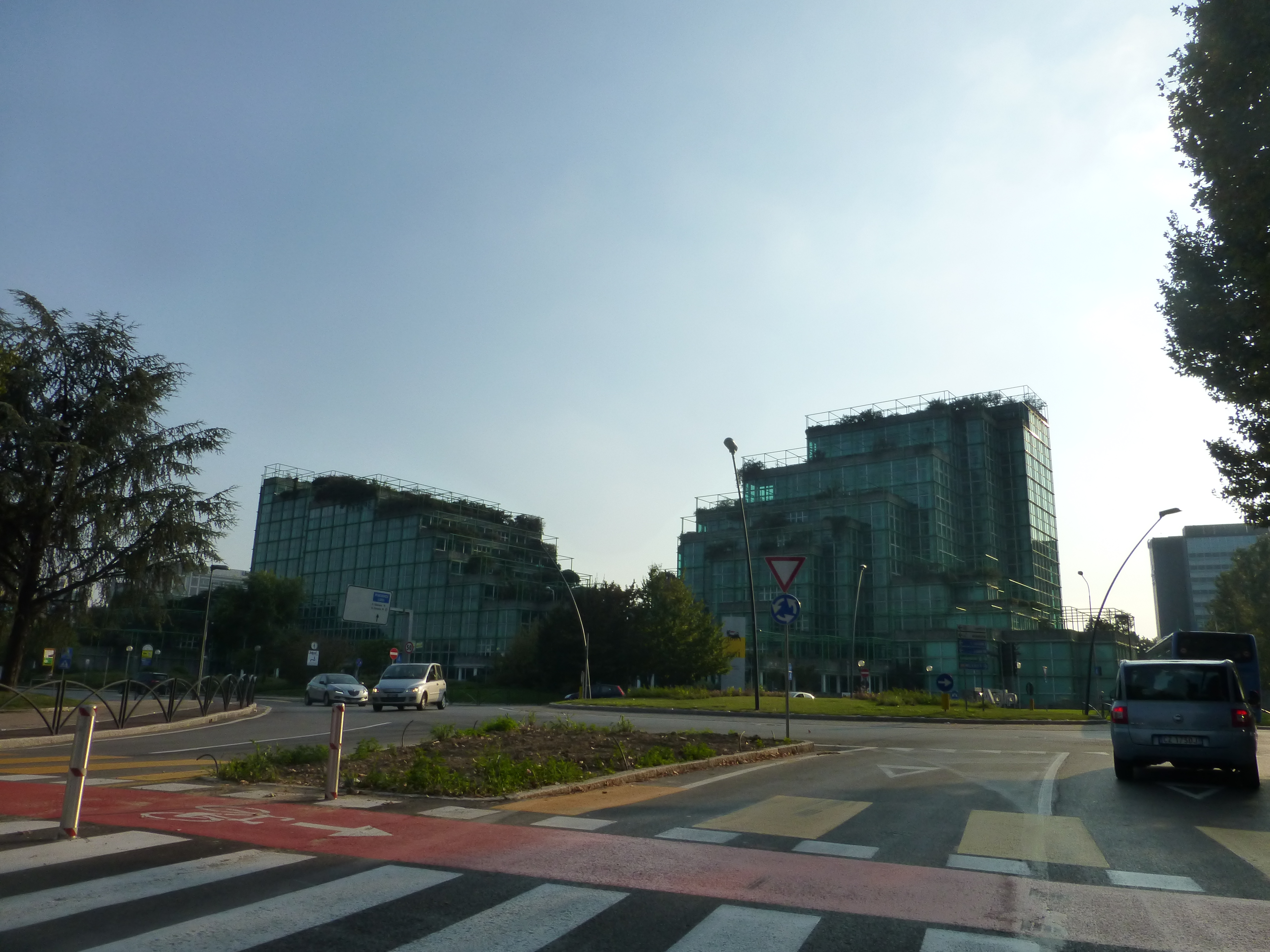 Quinto Palazzo uffici con rotonda san donato milanese 2013